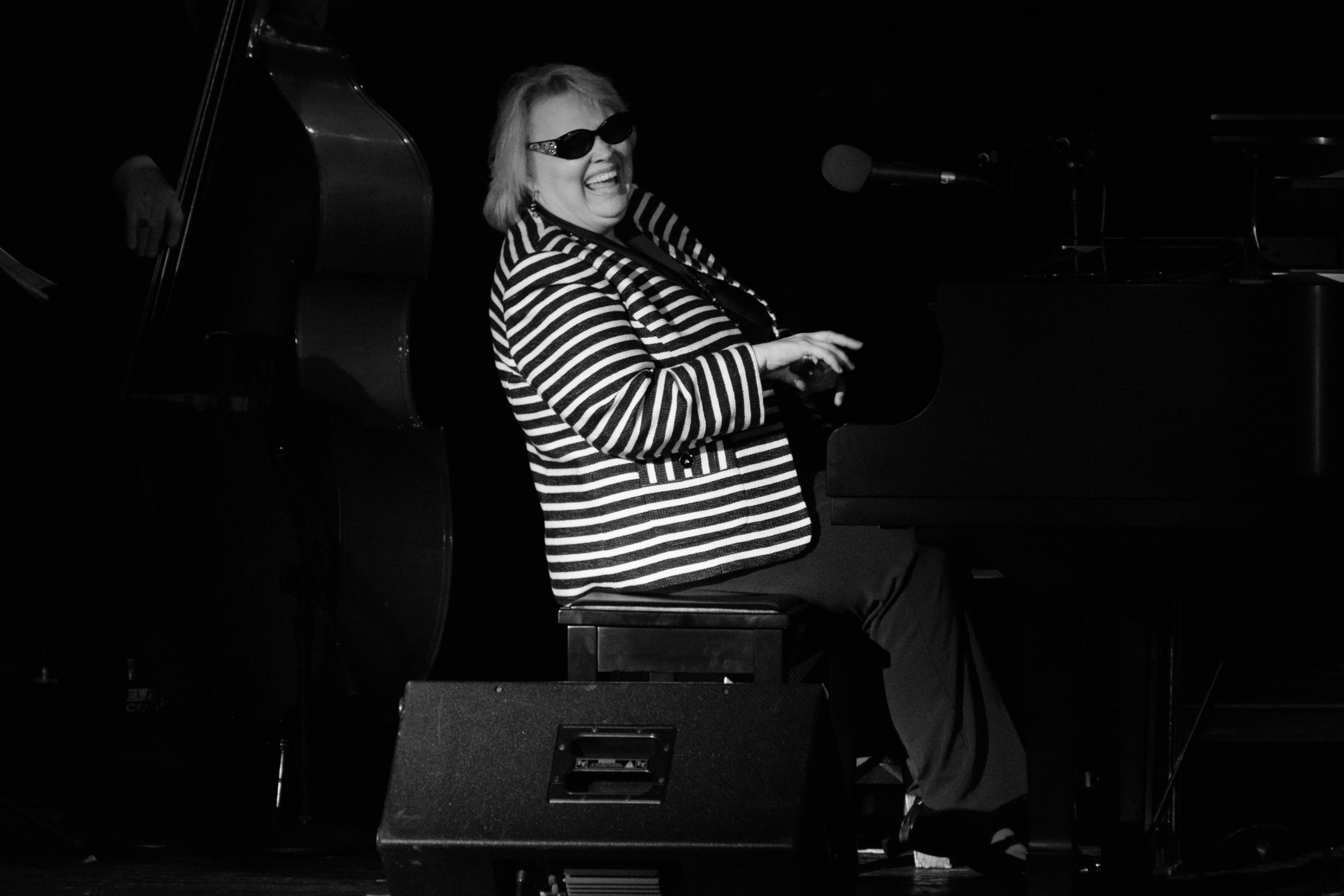 DSC_3063 edit